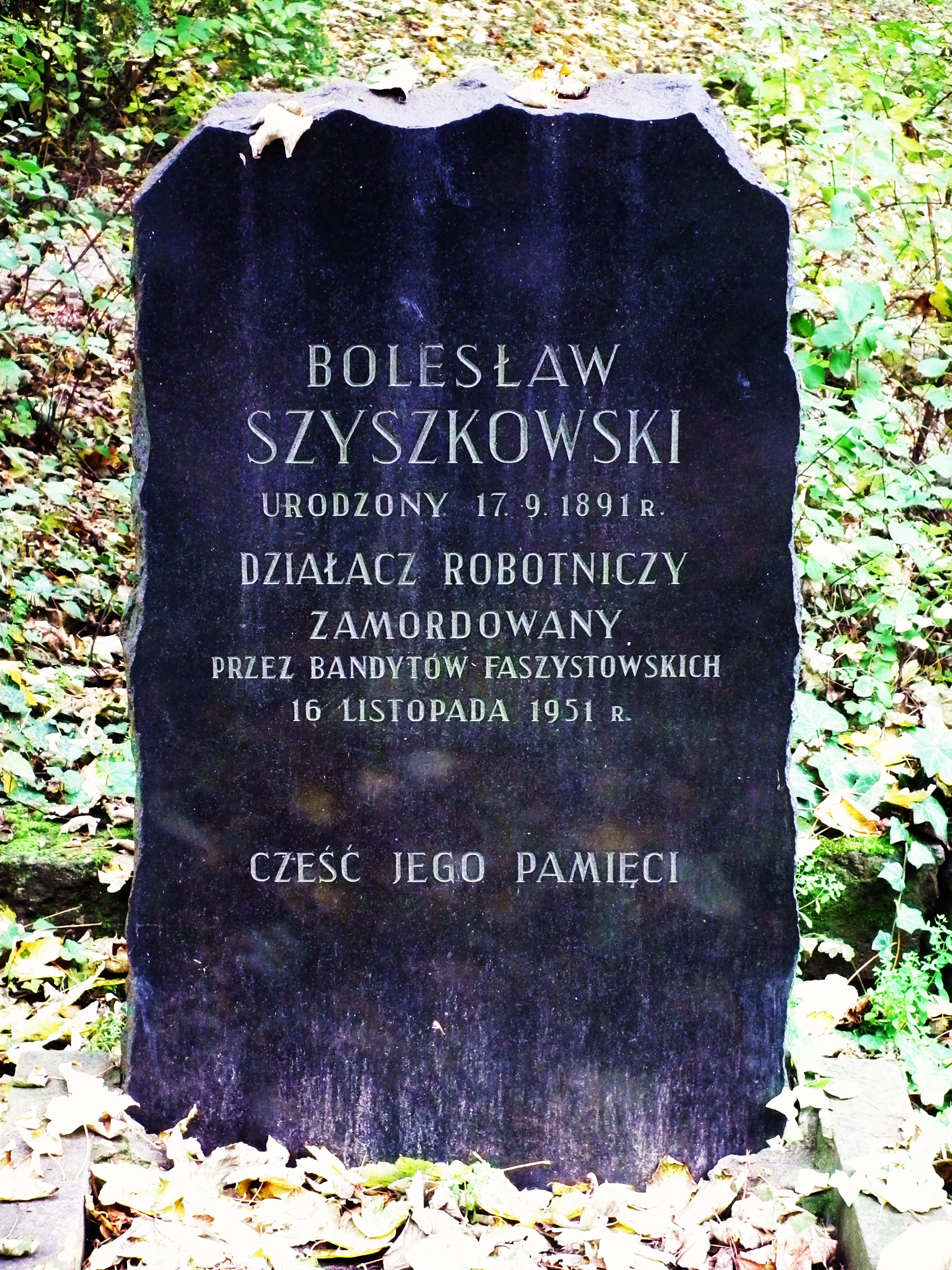 Cytadela Poznań. Grób B. Szyszkowskiego, ubeka. W 1951 r został zamordowany przez dezertera z LWP Bolesław Szyszkowski, UB- ek, przewodzący akcji zbierania znienawidzonych kontyngentów, które społeczeństwo musiało oddawać na rzecz państwa, a które w okolicach Grodziska Wlkp zostały ponownie wprowadzone w latach 50 z powodu złej sytuacji gospodarczej kraju. Oczywiście sprawę przypisywano działaniu "niedobitków rodzimej reakcji", choć działalność dezertera mordercy (zresztą pochodzącego gdzieś z Lubelszczyzny) miała charakter wyłącznie przestępczy (zamordował również przypadkowego mężczyznę i milicjanta). Rozpoczęła się inwigilacja środowisk wspierających wcześniej partyzantów - akcja "Zboże". W 1957 r "nieznani sprawcy" zniszczyli pomnik Szyszkowskiego, postawiony w drodze na Słocin, a w 1990 r odnowiony po tym pomnik został całkowicie zlikwidowany (za: ., "Podziemie niepodległościowe w zachodniej Wlkp").